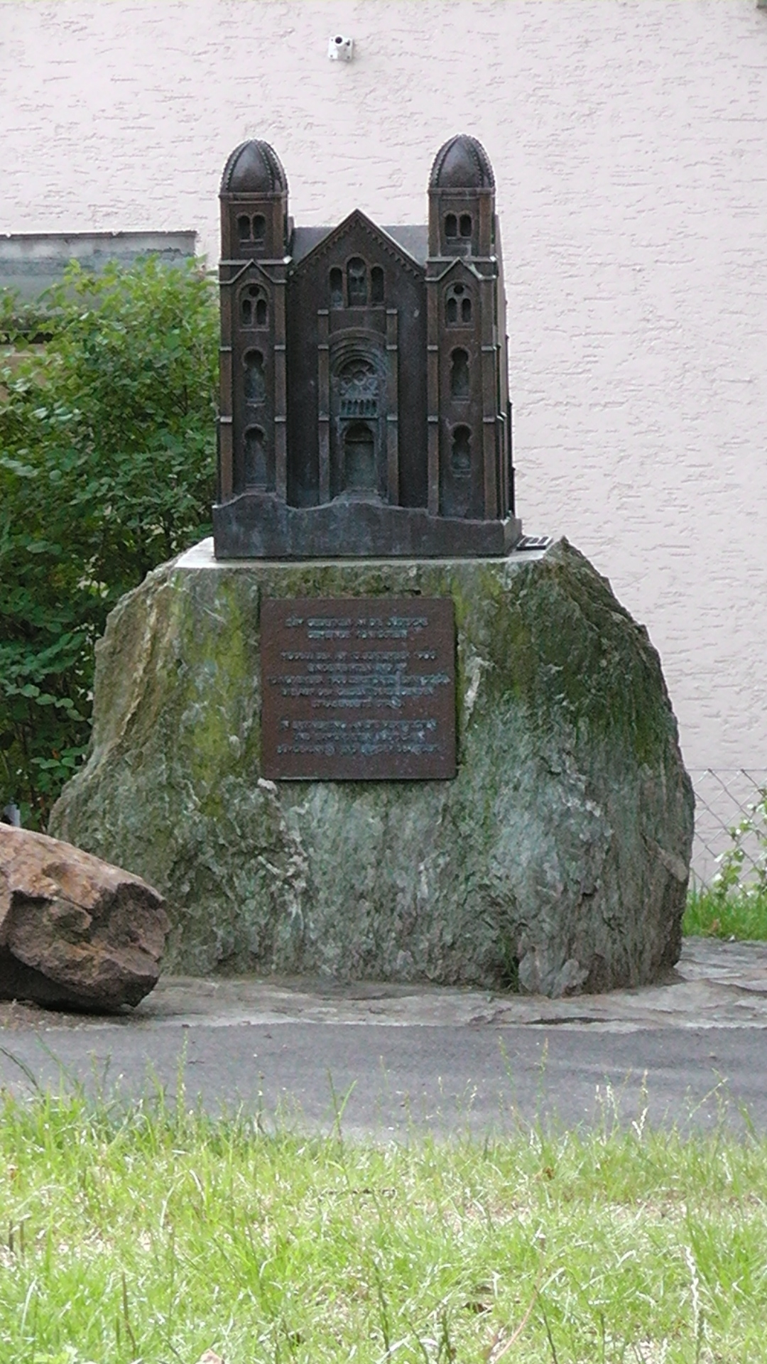 Ansicht des Denkmals zur Erinnerung an die ehemalige Synagoge in Königstein im Taunus (1906- Pogromnacht 1938). Das Denkmal ist ein in Bronze gegossenes vollplastisches Modell der Synagoge, das 1996 zum Gedenken an die vor 100 Jahren erbaute Synagoge aufgestellt wurde. Im Sockelbereich ist eine Gedenktafel für die ehemaligen jüdischen Bürger der Stadt angebracht.